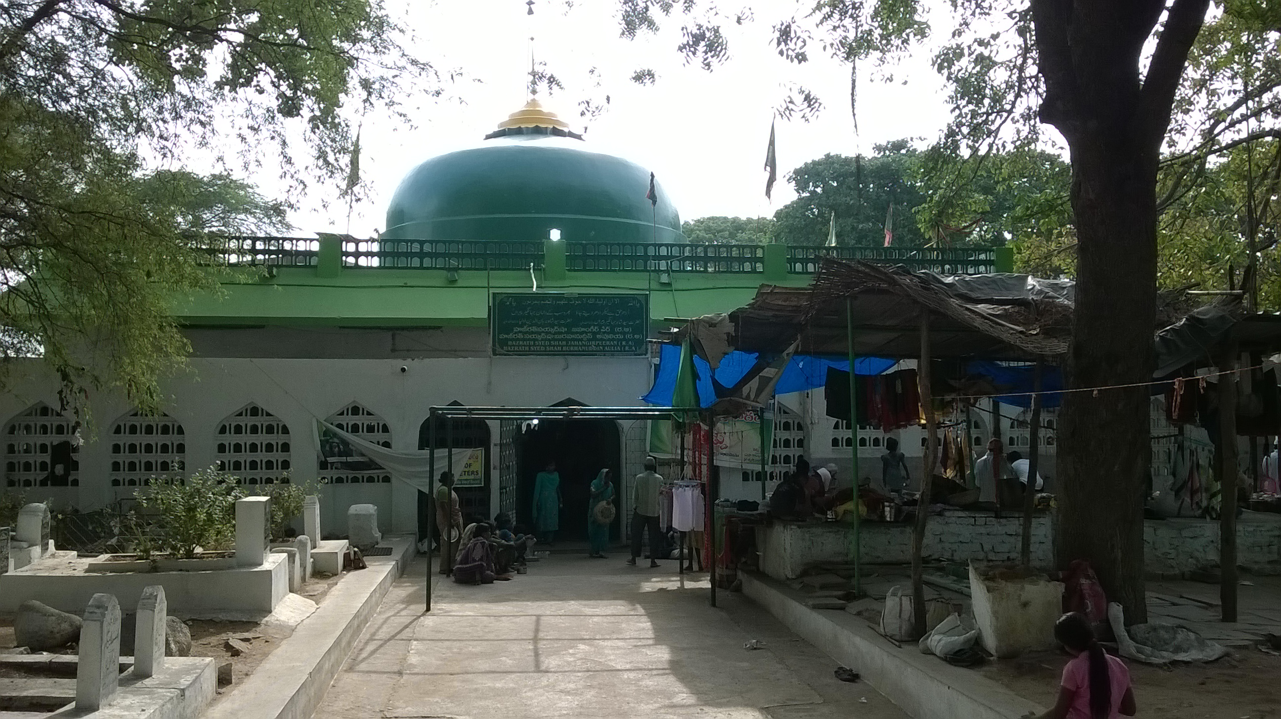 జహంగీర్ పీర్ దర్గా